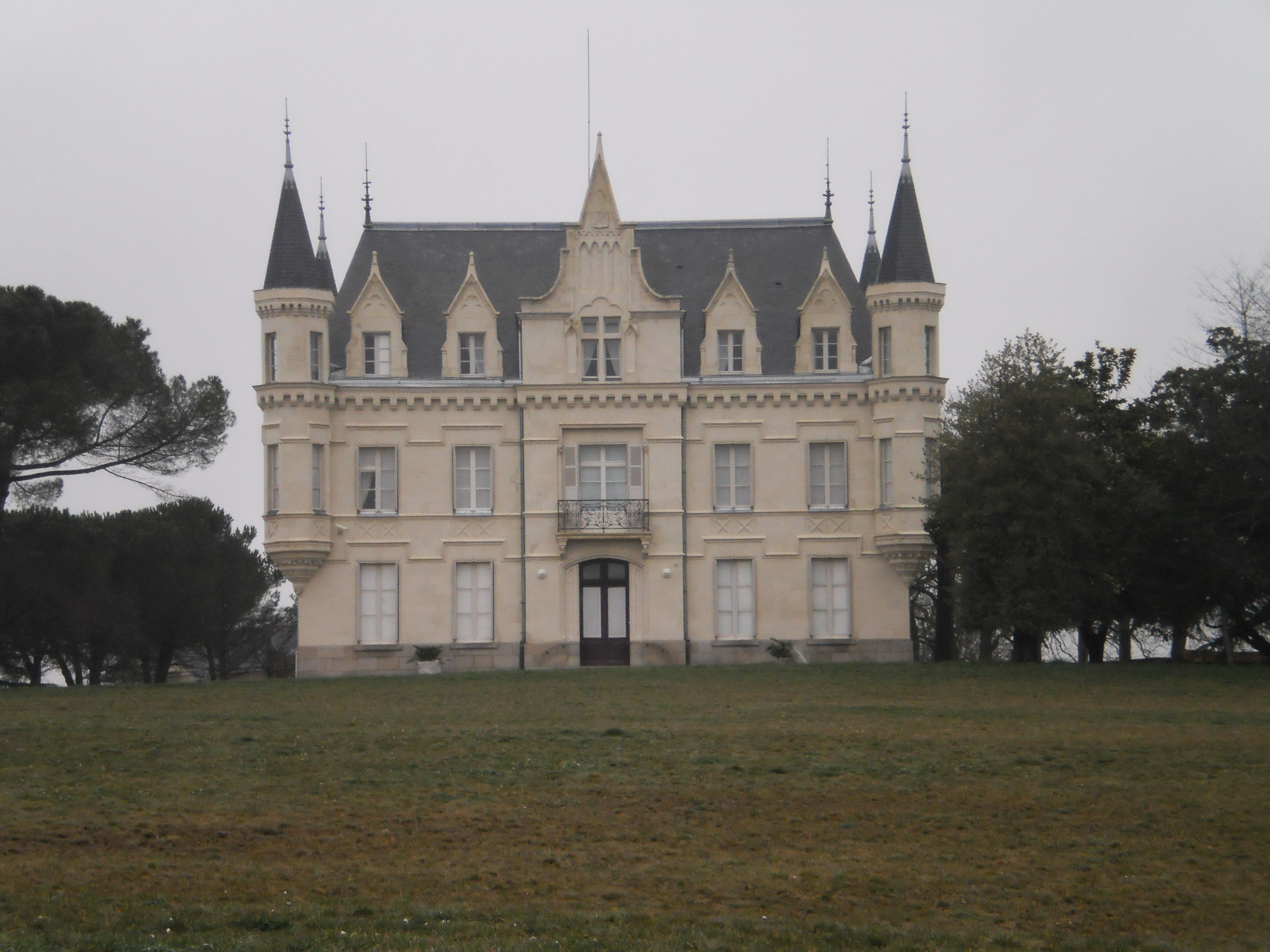 Le Fresne-sur-Loire (Loire-Atlantique, France) - château de la Fresnaie